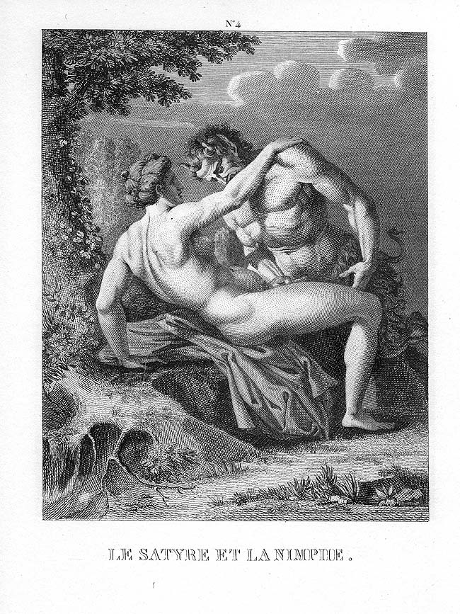 Agostino Carracci (1557 - 1602), Satyr et Nymphe